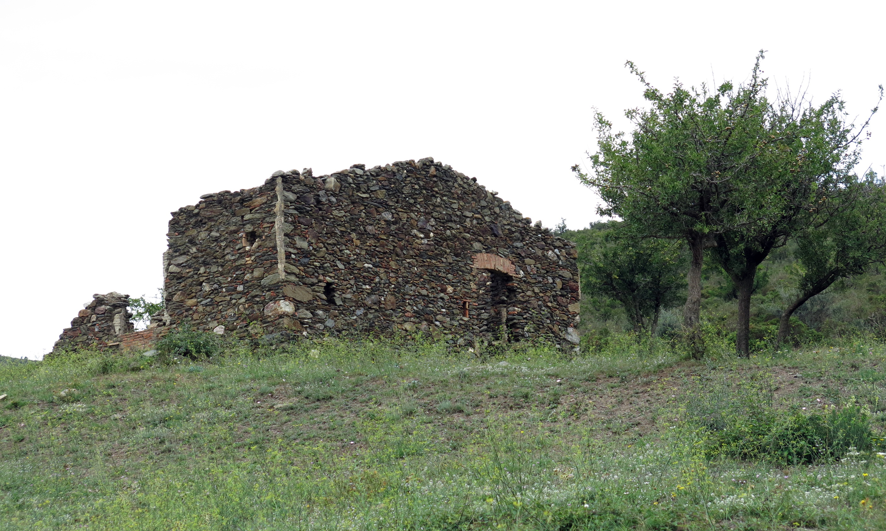 Conjunt monàstic de Sant Quirze de Colera (Rabós)